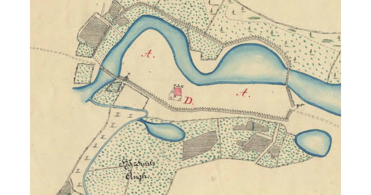 Karta Sundsvall, före 1670